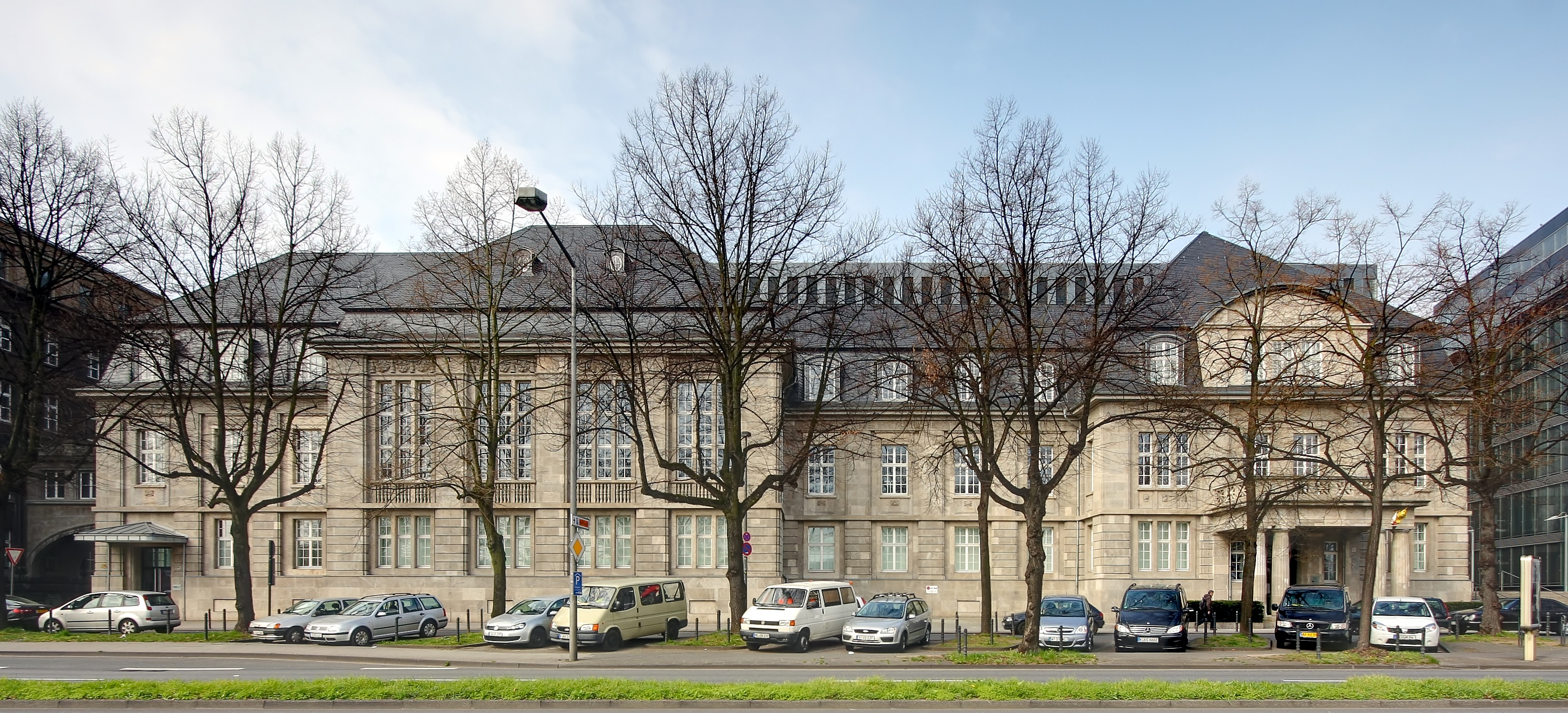 Denkmalgeschütztes ehemaliges Wohnhaus des Eisenbahnpräsidenten, Konrad-Adenauer-Ufer 5, Köln. Baujahr: 1906-13, Architekten: Carl Biecker, Heinrich Kayser und Martin Kießling